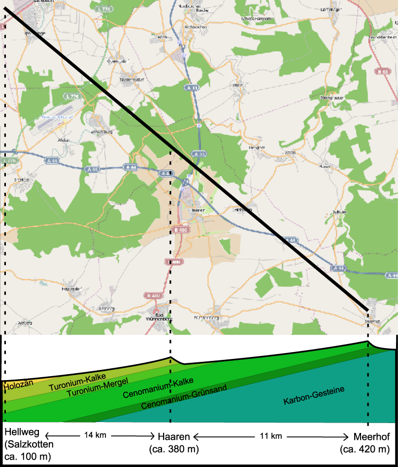 geologischer Aufbau des Sintfelds